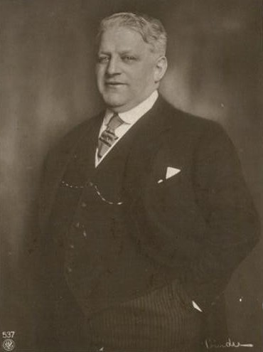 Der deutsche Schauspieler Ferry Sikla